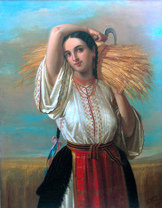 Gheorghe Tattarescu - Ţărancă din Vlaşca, ulei pe pânză, deţinător: Complexul Muzeal "Iulian Antonescu".